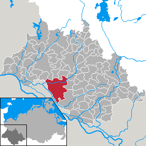 Lübtheen in Mecklenburg-Vorpommern - district Ludwigslust